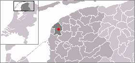 Locatie van Franeker, zelf gemaakt uit sjabloon van Wikipedia-gebruiker Mtcv